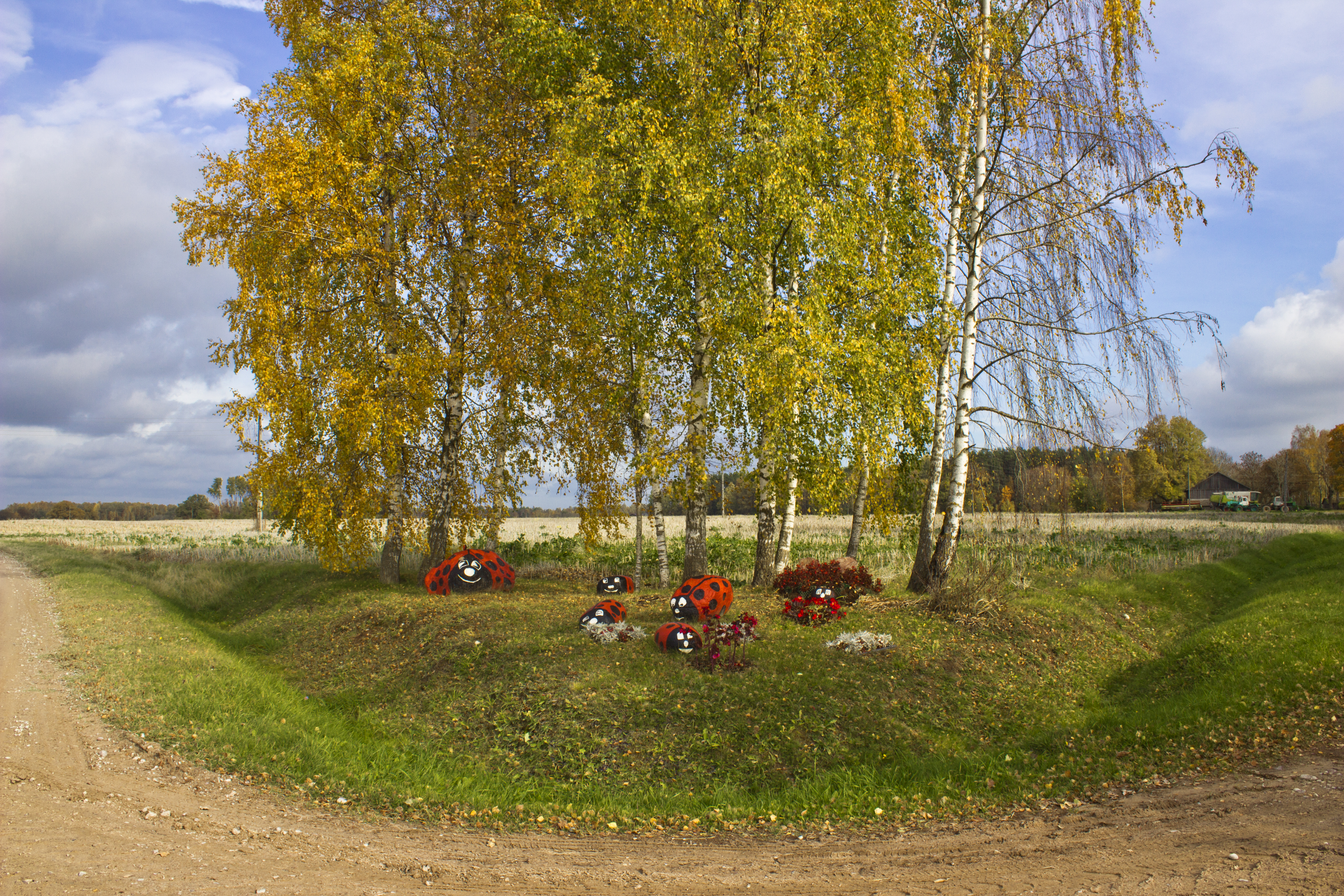 Sārcene